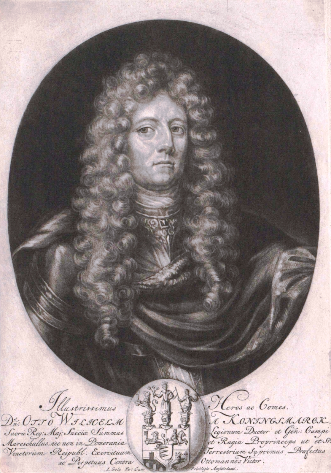 Otto Wilhelm von Königsmarck (1639–1690)